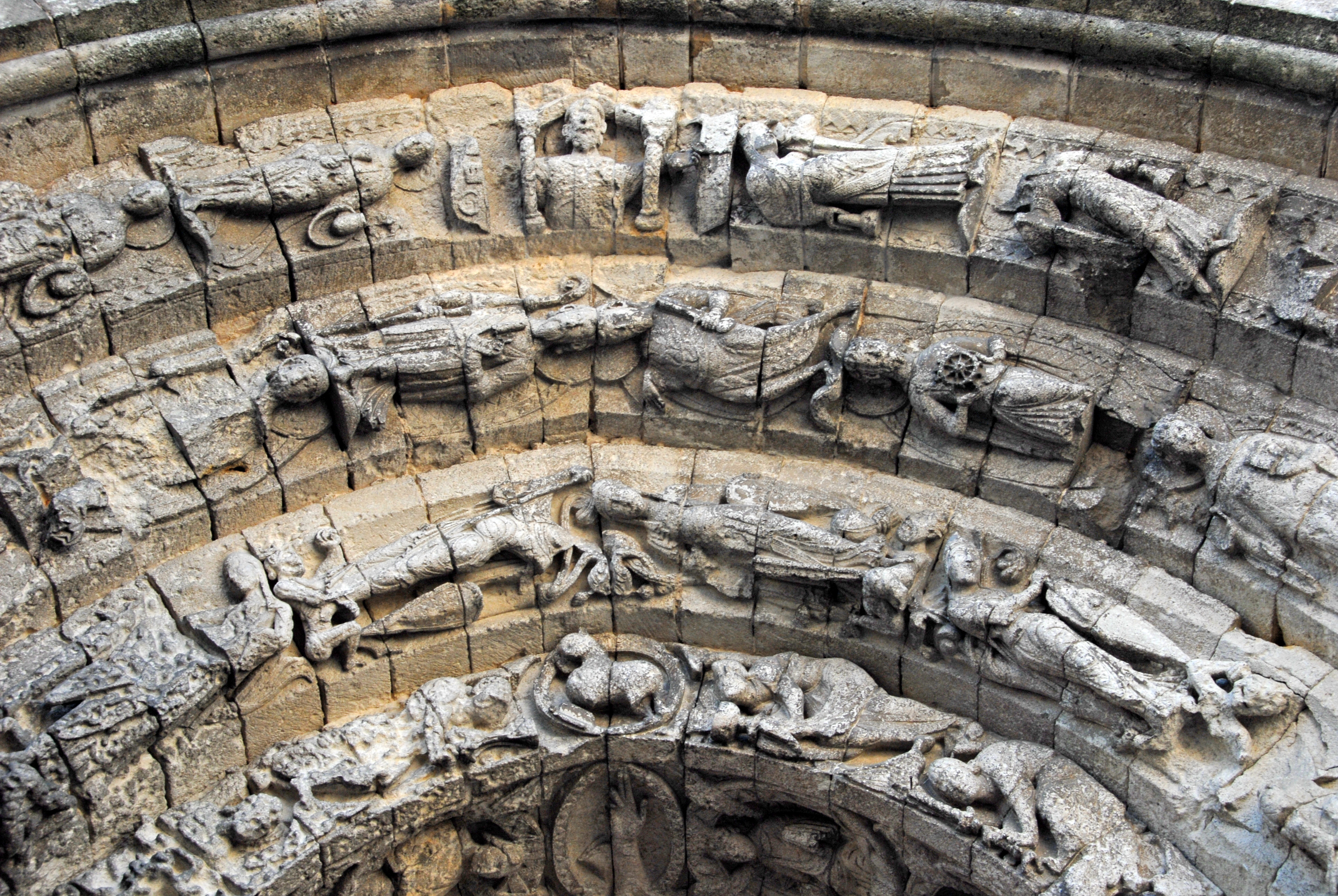 St-Pierre de Pont-l’Abbé-d’Arnoult (17), Portaldetail, Archivoltenskulptur